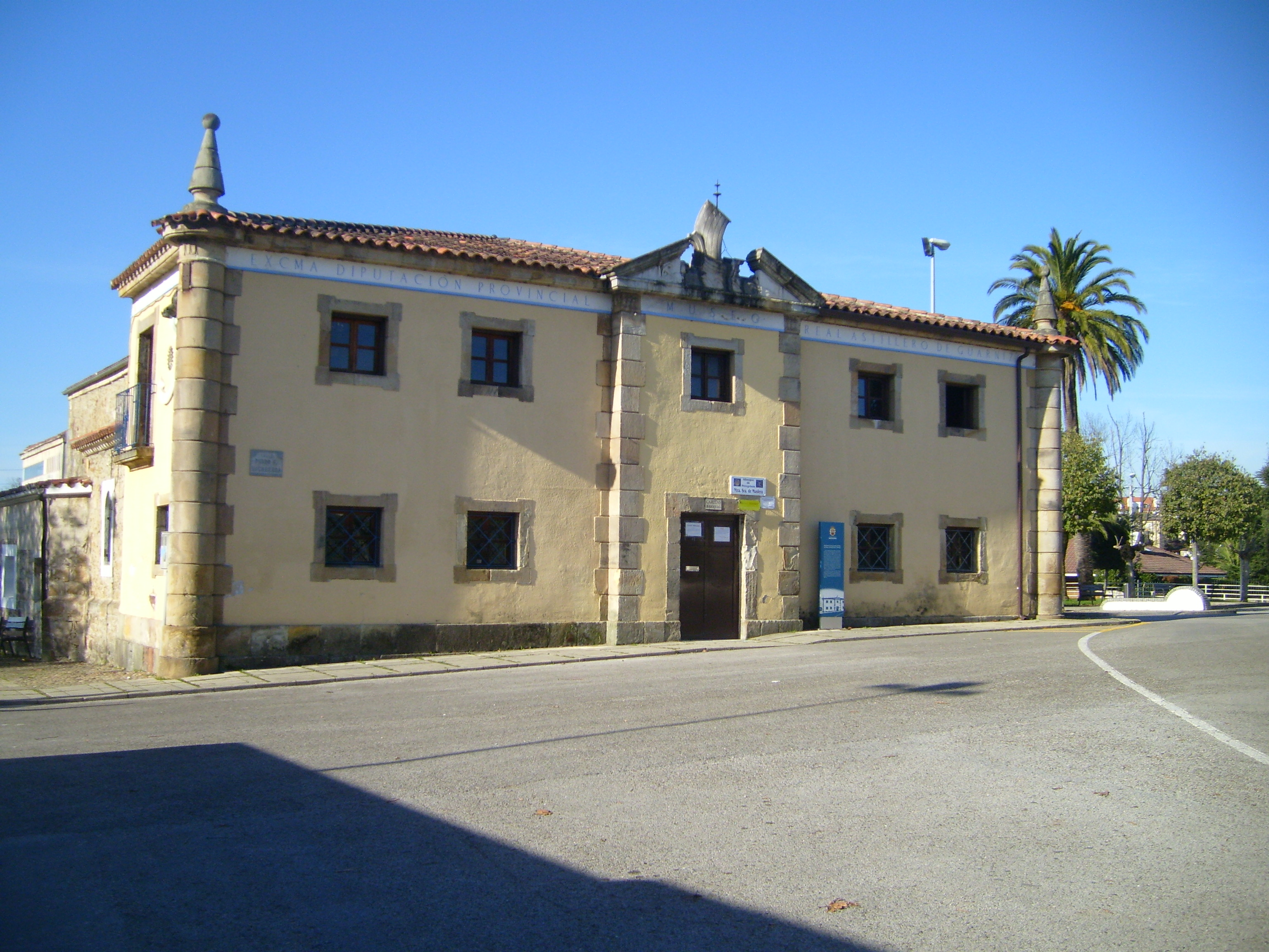 Vista frotal de la Iglesia de Nuestra Señora de Muslera situada en Guarnizo